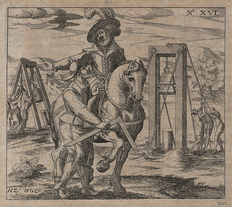 Original image description from the Deutsche Fotothek Mechanik & Hebezeug & Ramme & Seil